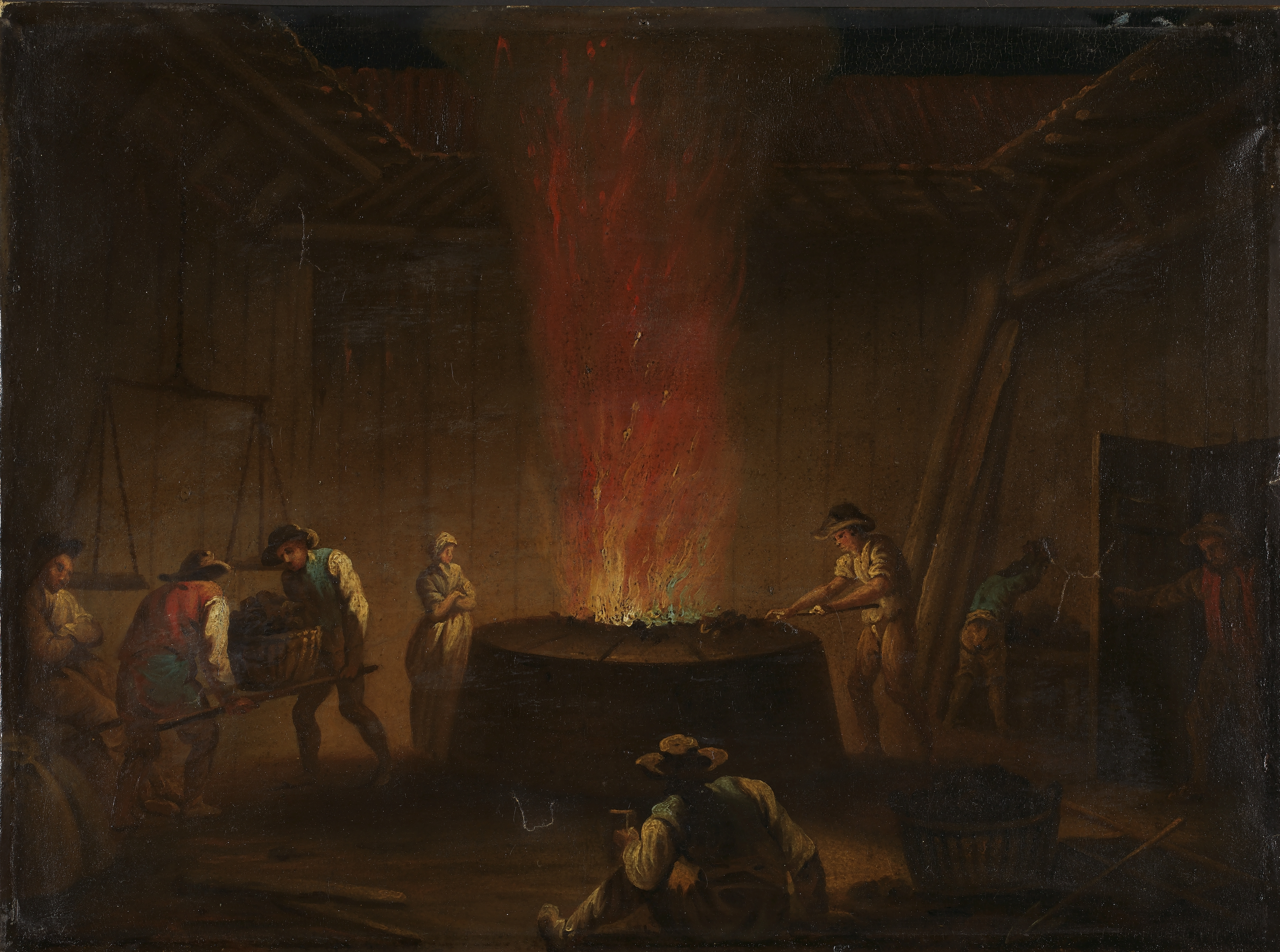 Masovner på Bærums Verk, olje på lerret, 31,5 x 42 cm